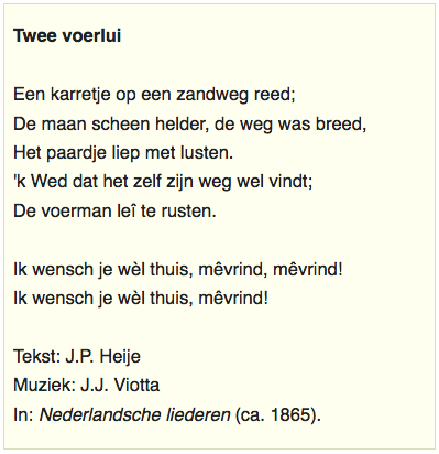 J.P. Heije (1809-1876) en J.J. Viotta (1814-1859), tekst liedje 'Een karretje op een zandweg reed' (1865). Opgenomen in het liedboek "Kun je nog zingen, zing dan mee" (1906).